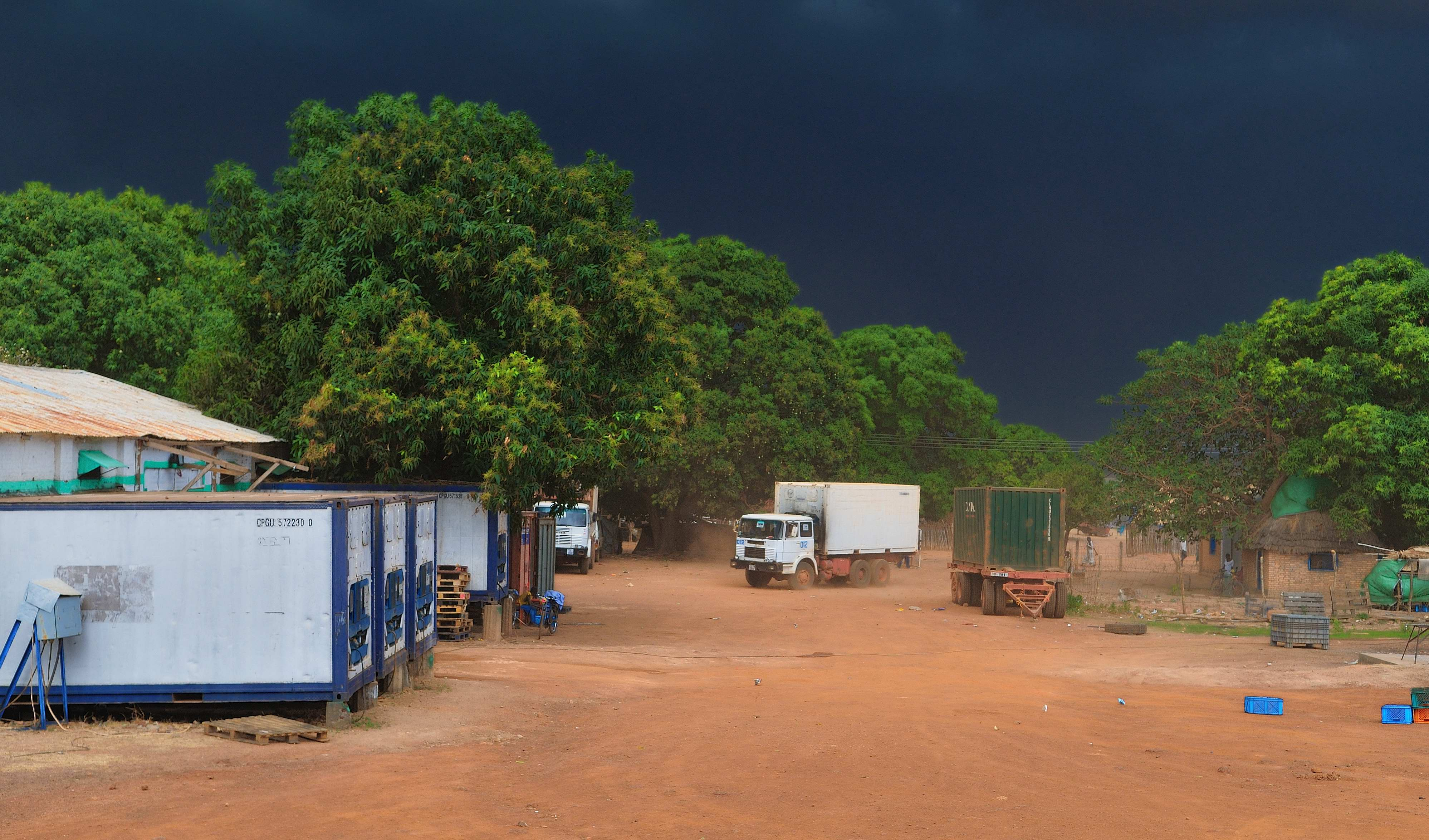 ES-KO Warehouse, Wau, Sudan